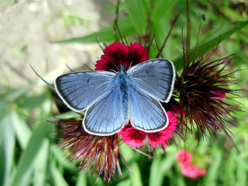 Polyommatus amandus. Veseluvka, Jonava district, Lithuania.